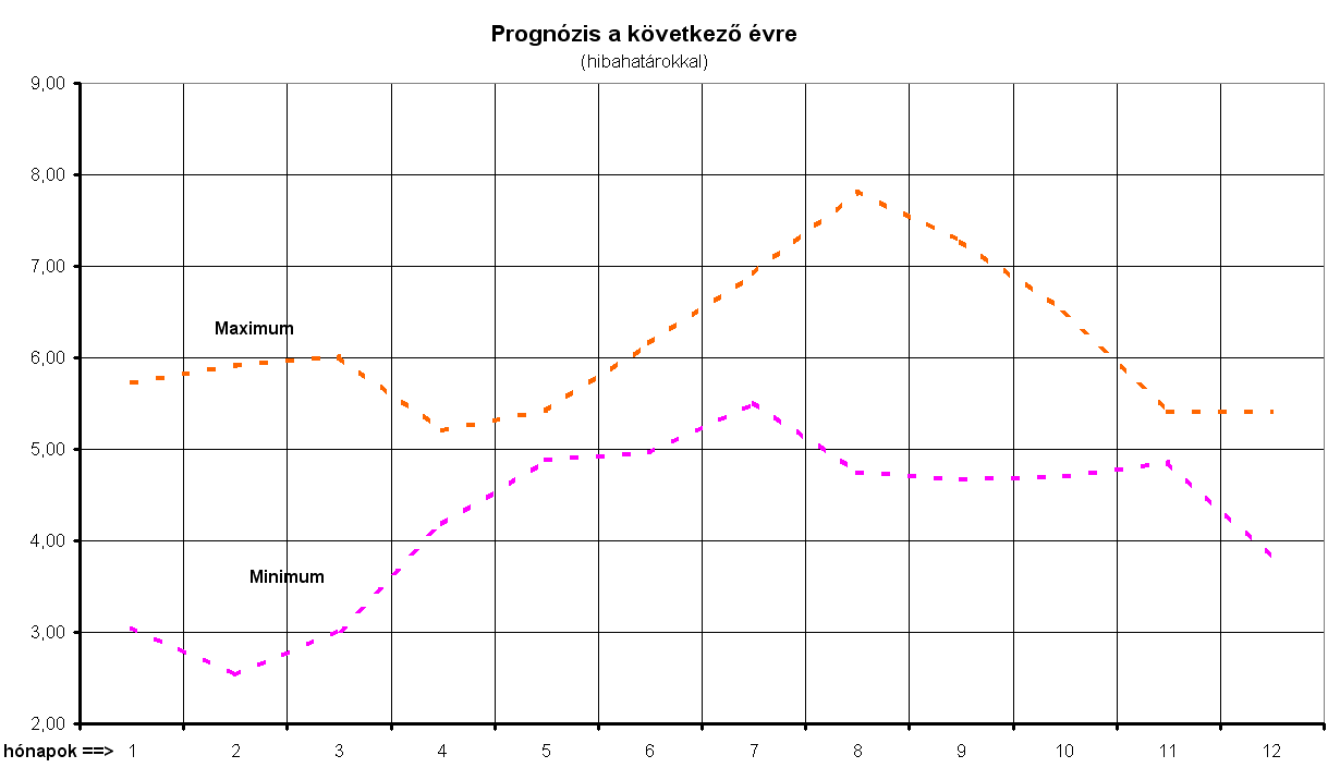 Time serie based prognosis llustration